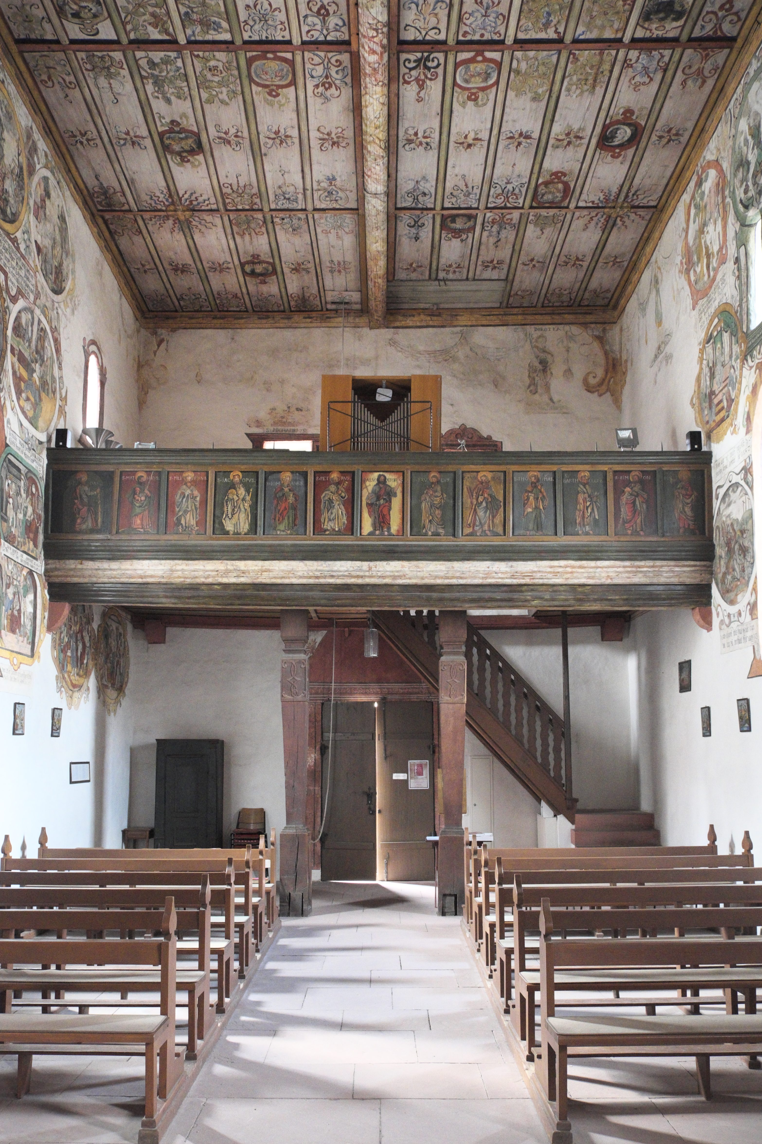 Katholische Martinskapelle in Bürgstadt im Landkreis Miltenberg (Unterfranken/Bayern), Innenraum